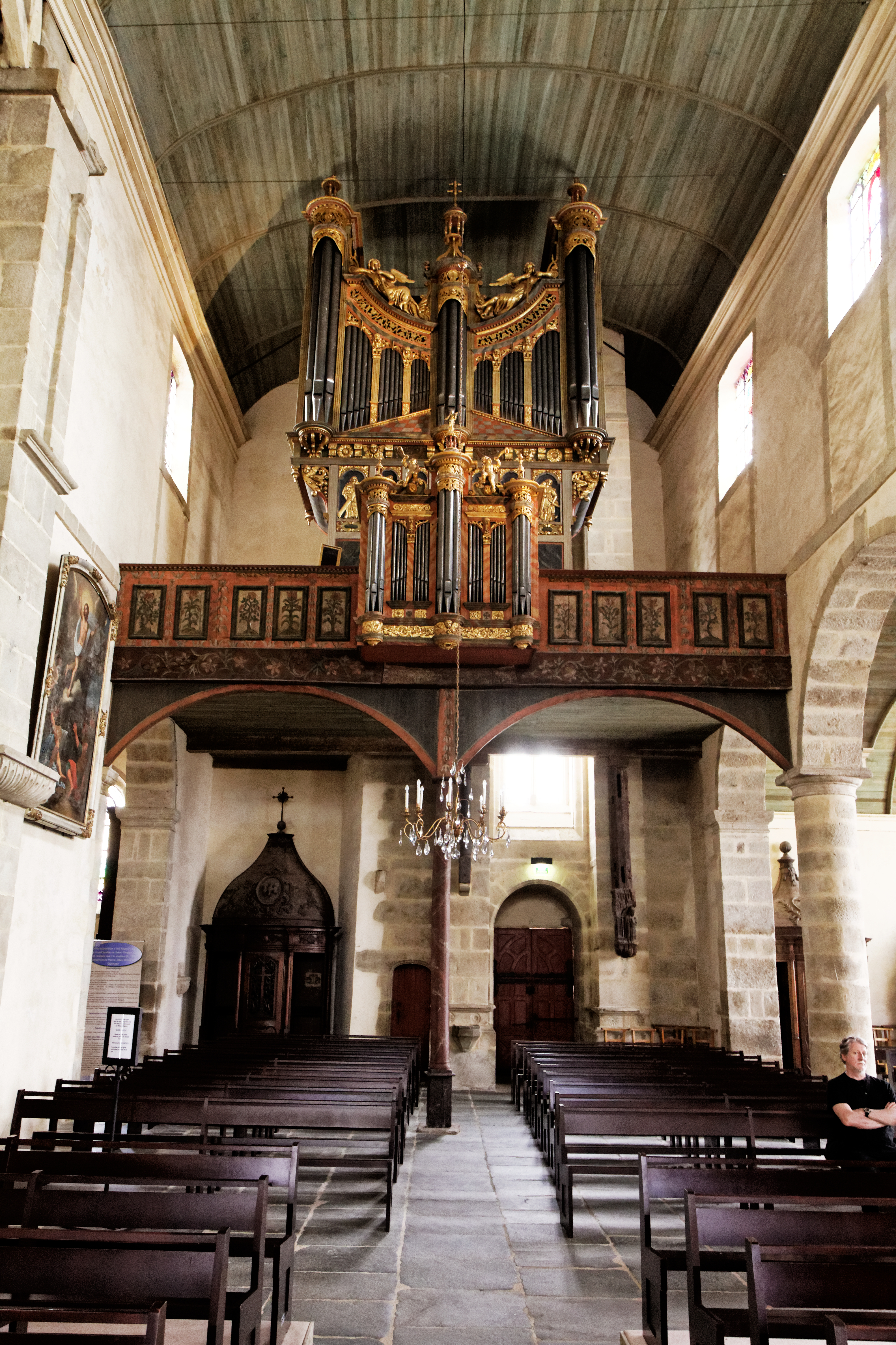 L'enclos paroissial de Saint Thegonec dans le Finistère.